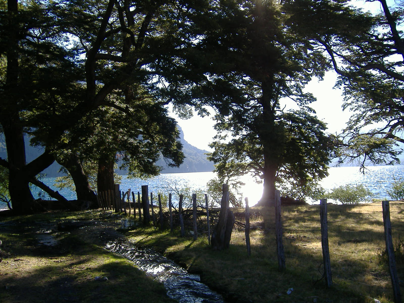 Lago Paimún, Neuquén, Argentina